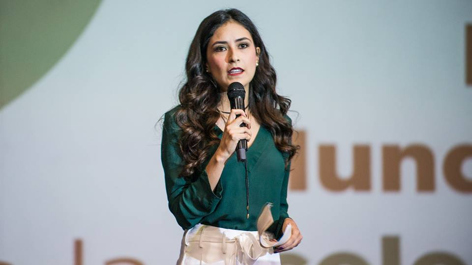 Dani Chávez en el Foro Ladrillero